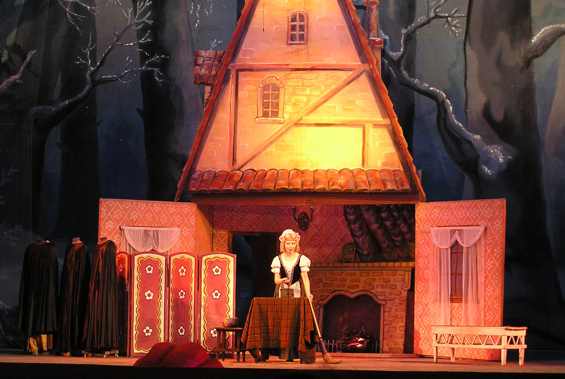 Донецкий театр оперы и балета. Постановка «Золушки» А. Спадавеккиа. Золушка дома.